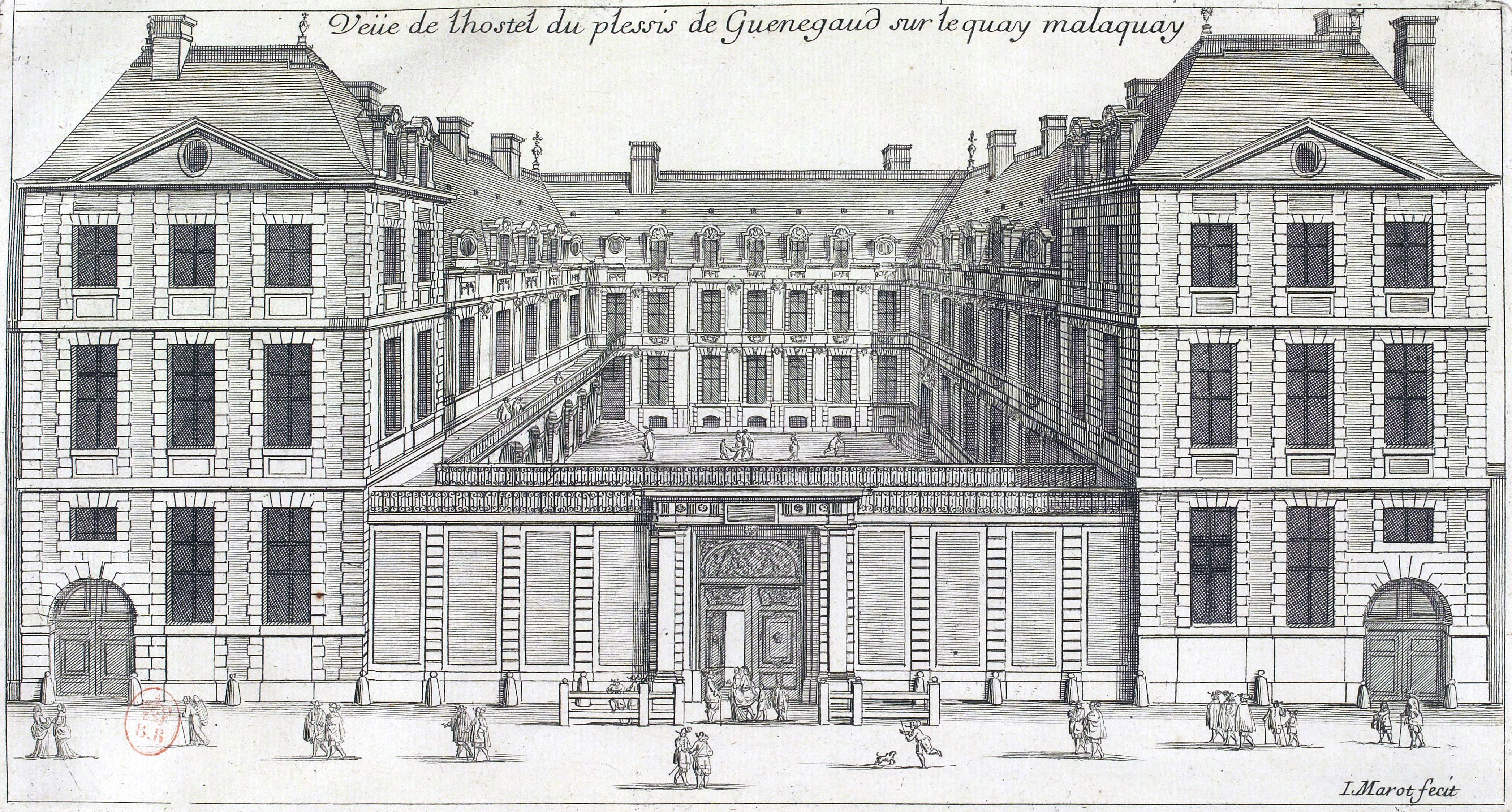 Plate from Jean Marot's L'Architecture française